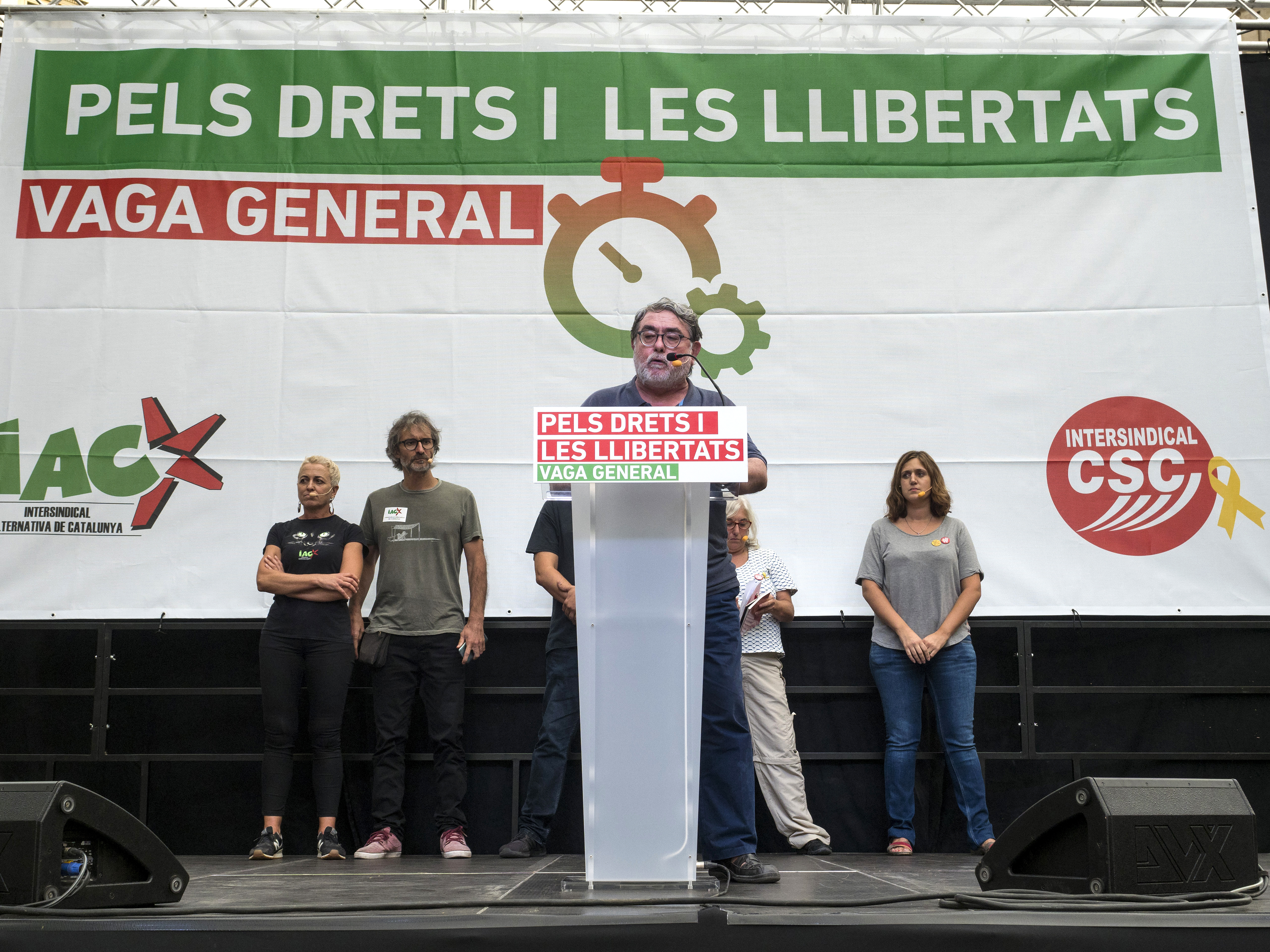 18 octubre de 2019 Aturada de país "Pels drets i les llibertats" Vaga general. ©Dani Codina/Òmnium